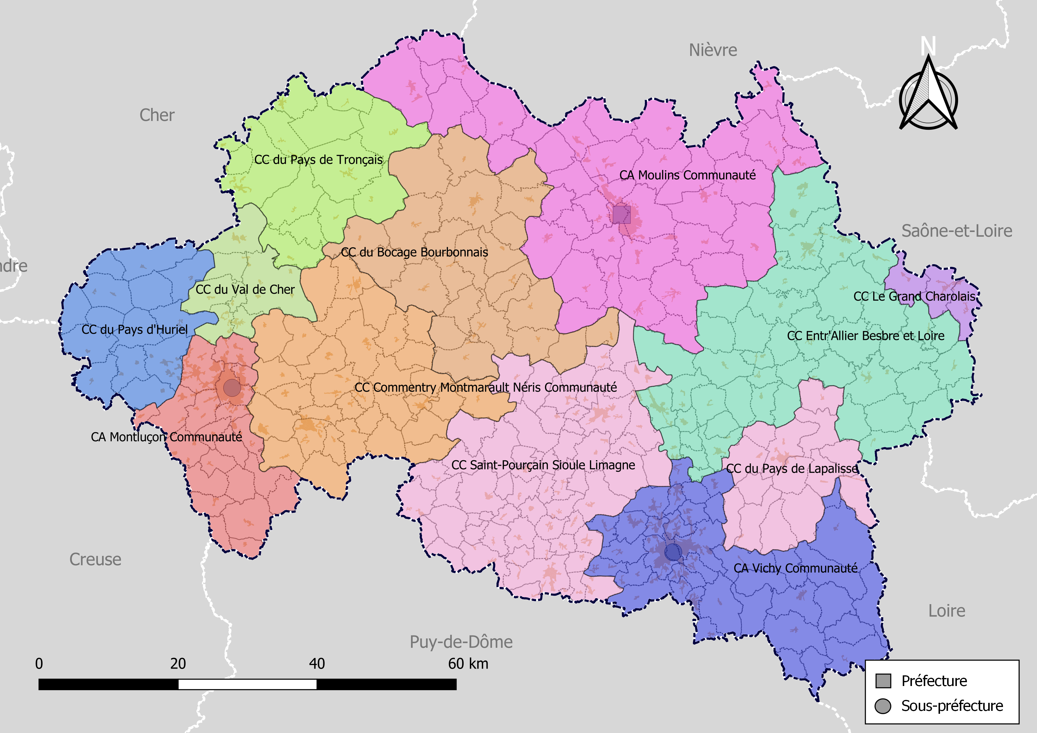 Carte des intercommunalités du département de l'Allier, France. Composition au 1er janvier 2019.